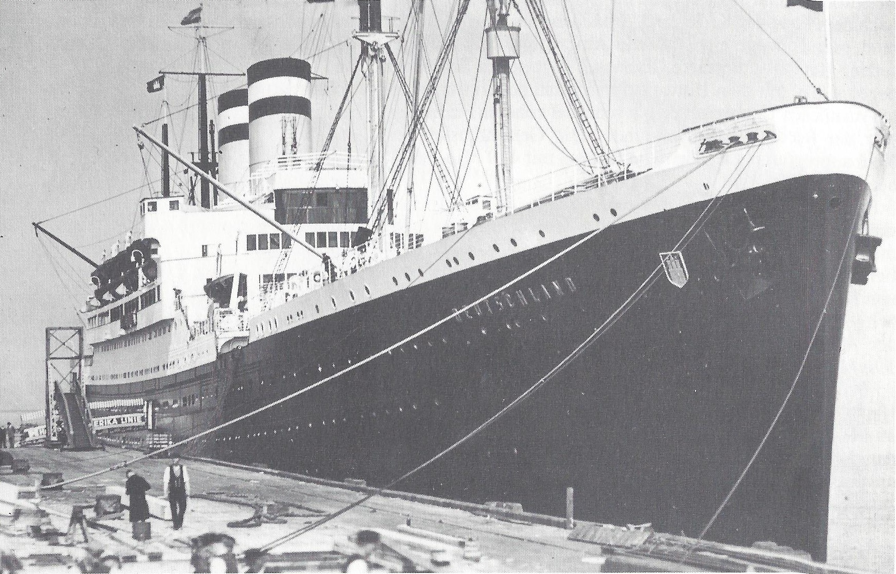 Deutschland (Schiff, 1932) an der Pier; am Bug das Hamburger Wappen für den Heimathafen.